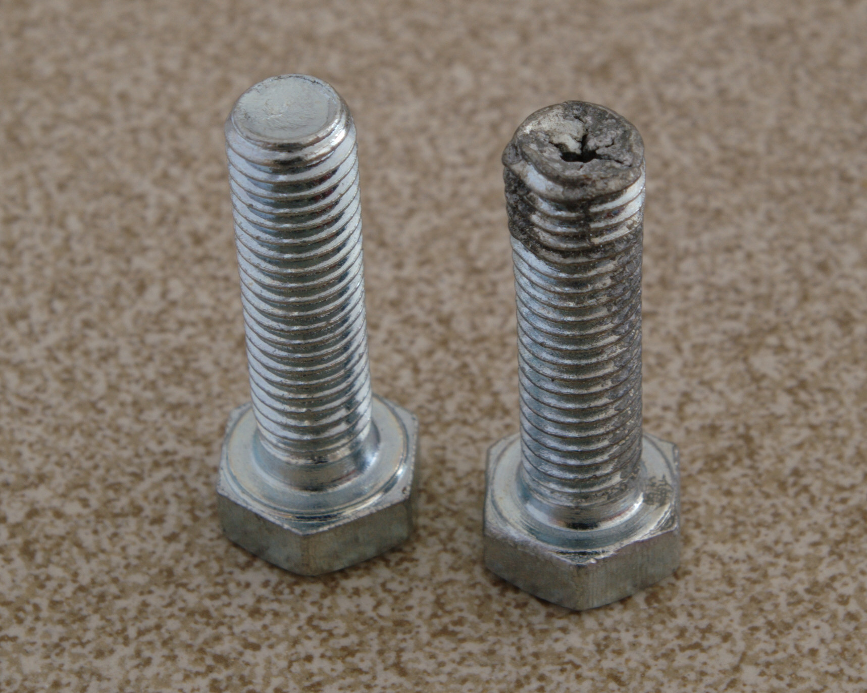 typischer Produktionsfehler bei einer Schraube durch Verwendung minderwertigen Stahldrahts